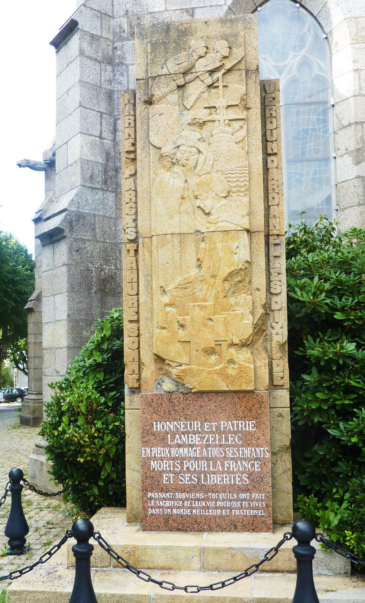 Brest Lambézellec : le monument aux morts du bourg de Lambézellec